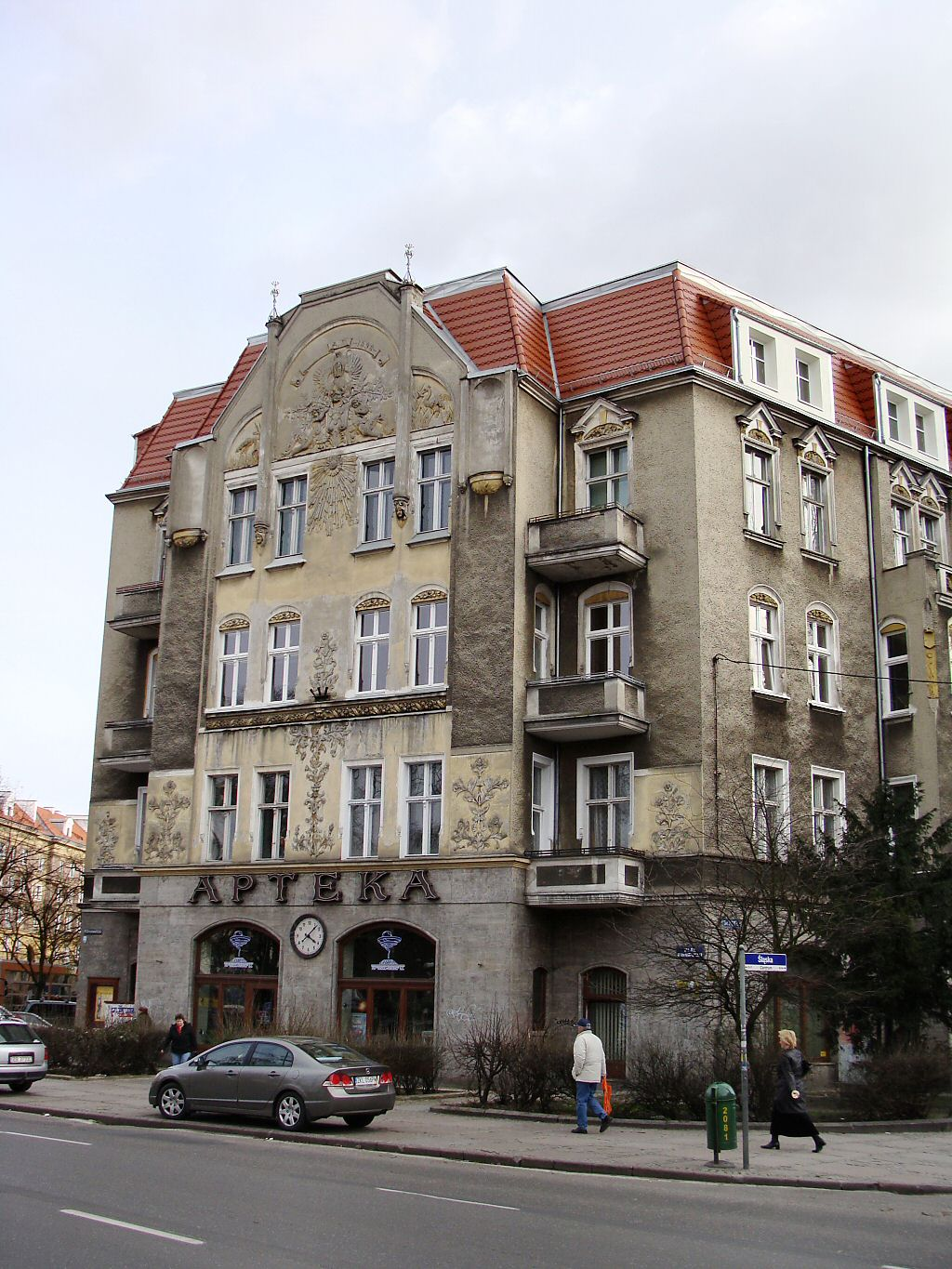 Kamienica przy al. Jana Pawła II nr 42 w Szczecinie (zabytek nr rejestr. 787)